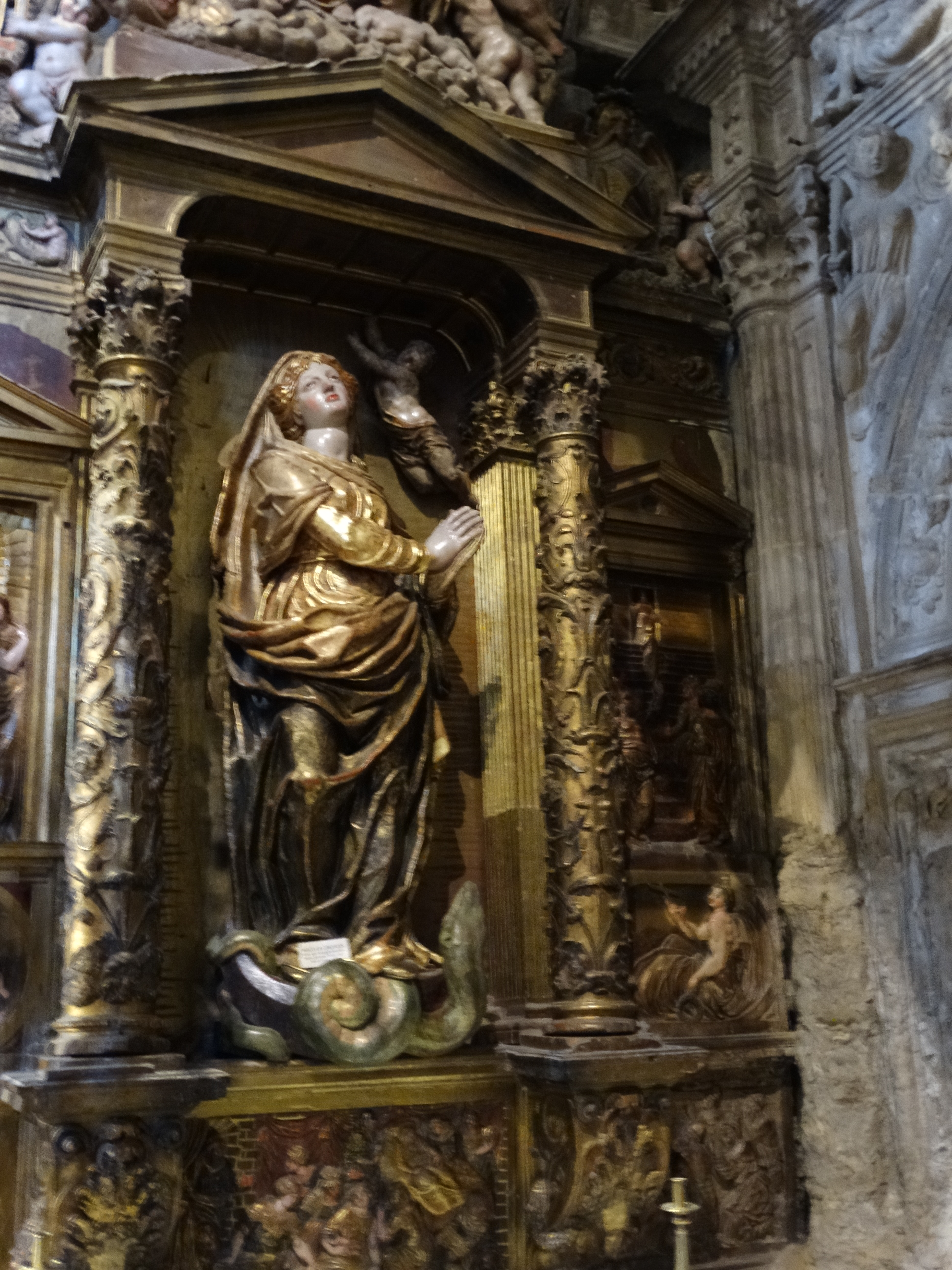 Iglesia de Nuestra Señora de la Asunción en Briones, La Rioja (España). Capilla de los Ircio o de los Hircio. Se terminó de construir en 1568. Fundada por los hermanos Hircio: Martín fue alcalde y Pedro compañero de viaje de Hernán Cortés en la conquista de México. Retablo romanista con la vida de la Virgen. Imagen de la Inmaculada. Las esculturas son obra de Pedro de Arbulo c. 1564.